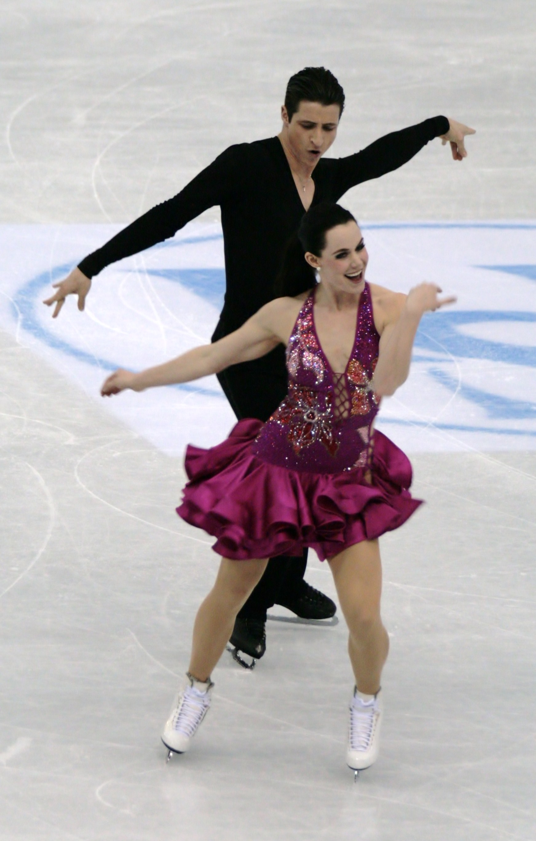 Тесса Вертью и Скотт Моир (Канада) на чемпионате мира по фигурному катанию 2012